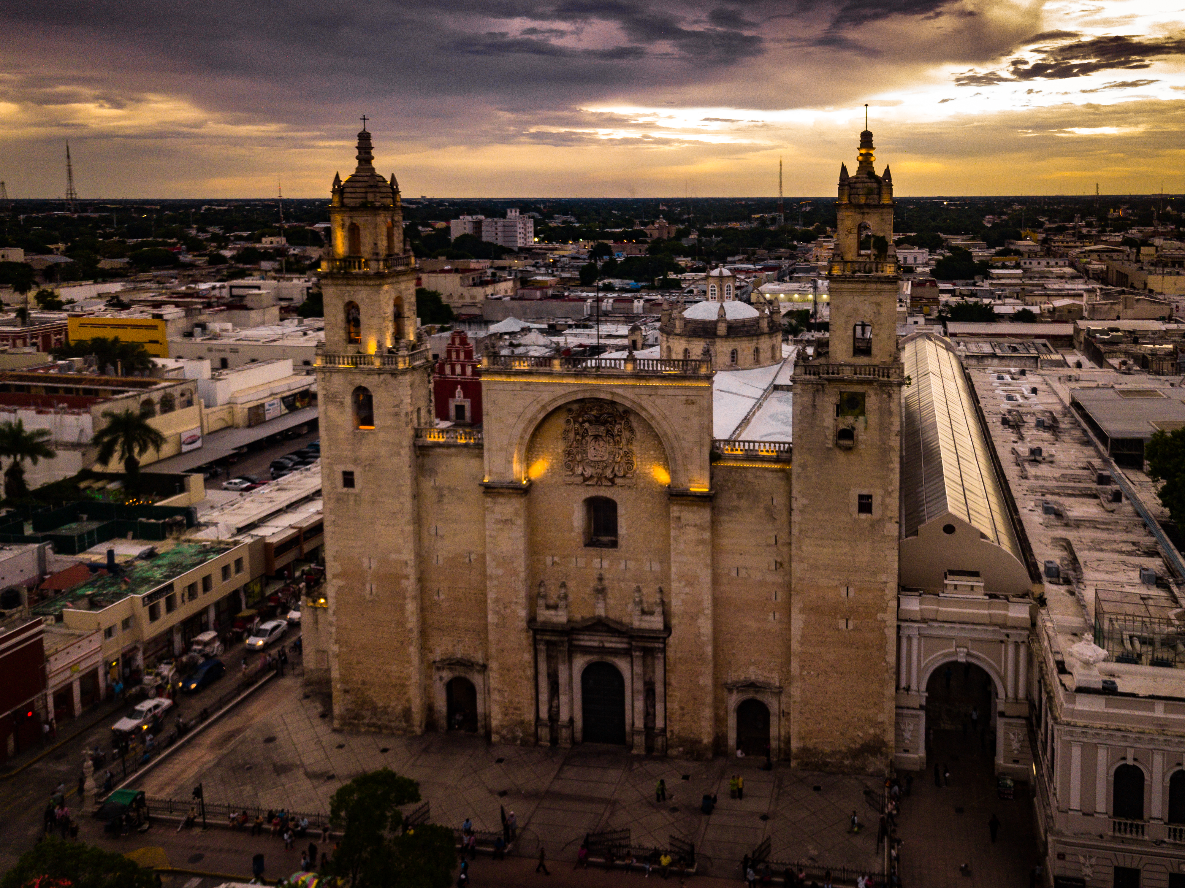 Catedral de San Ildefonso Mérida, es la catedral más antigua de todo México.